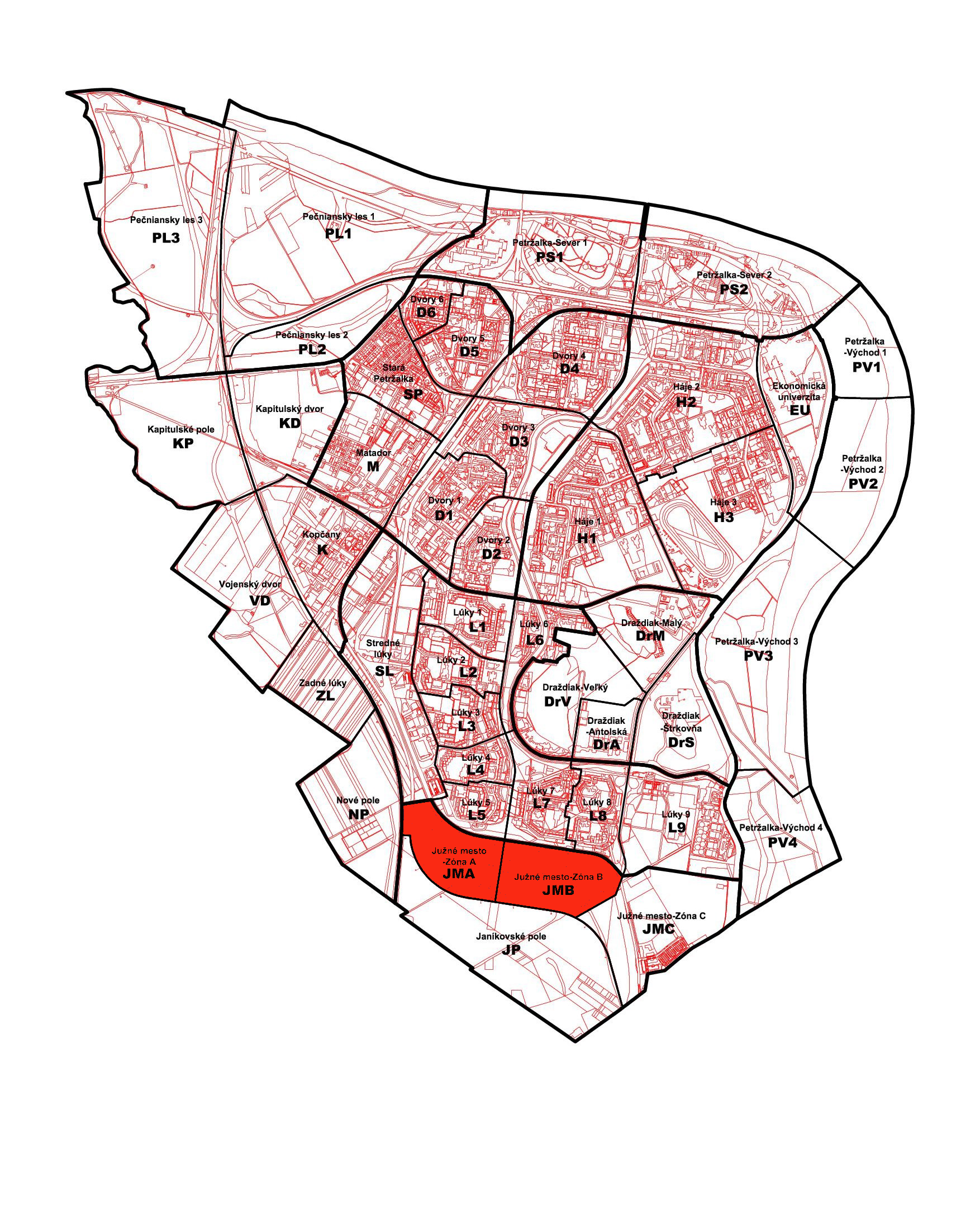 Poloha miestnej časti Petržalky